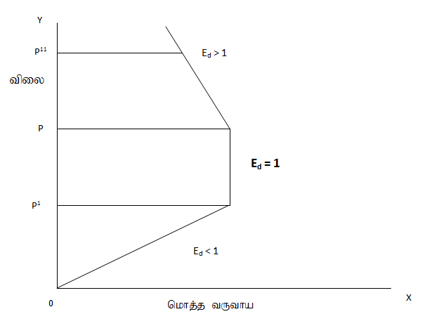 தேவையின் நெகிழ்ச்சியை அளக்கும் மொத்த வருவாய் முறையின் வரைபடம்